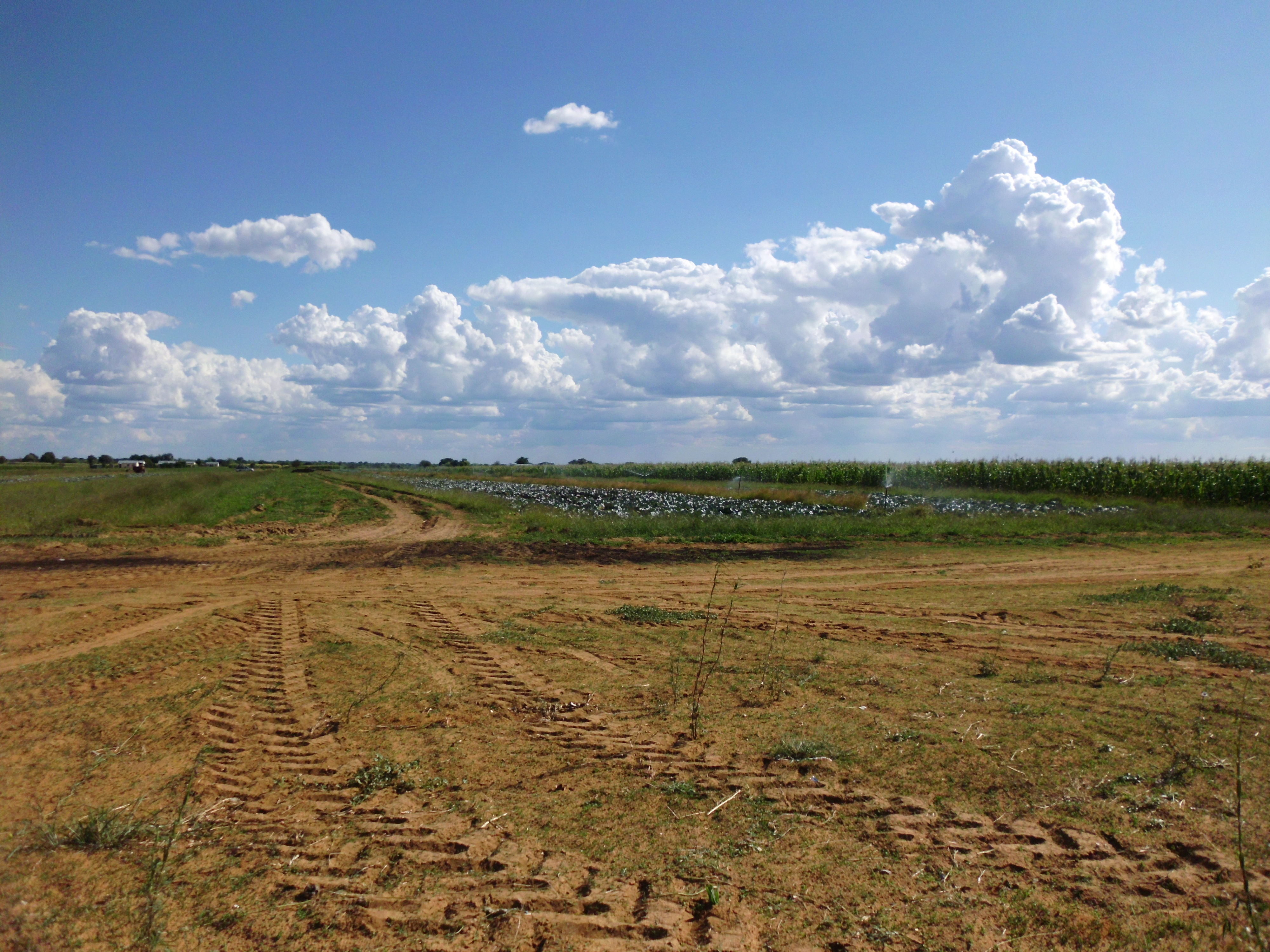 Bewässertes Krautfeld auf dem Gelände des Etunda Irrigation Project (2011).